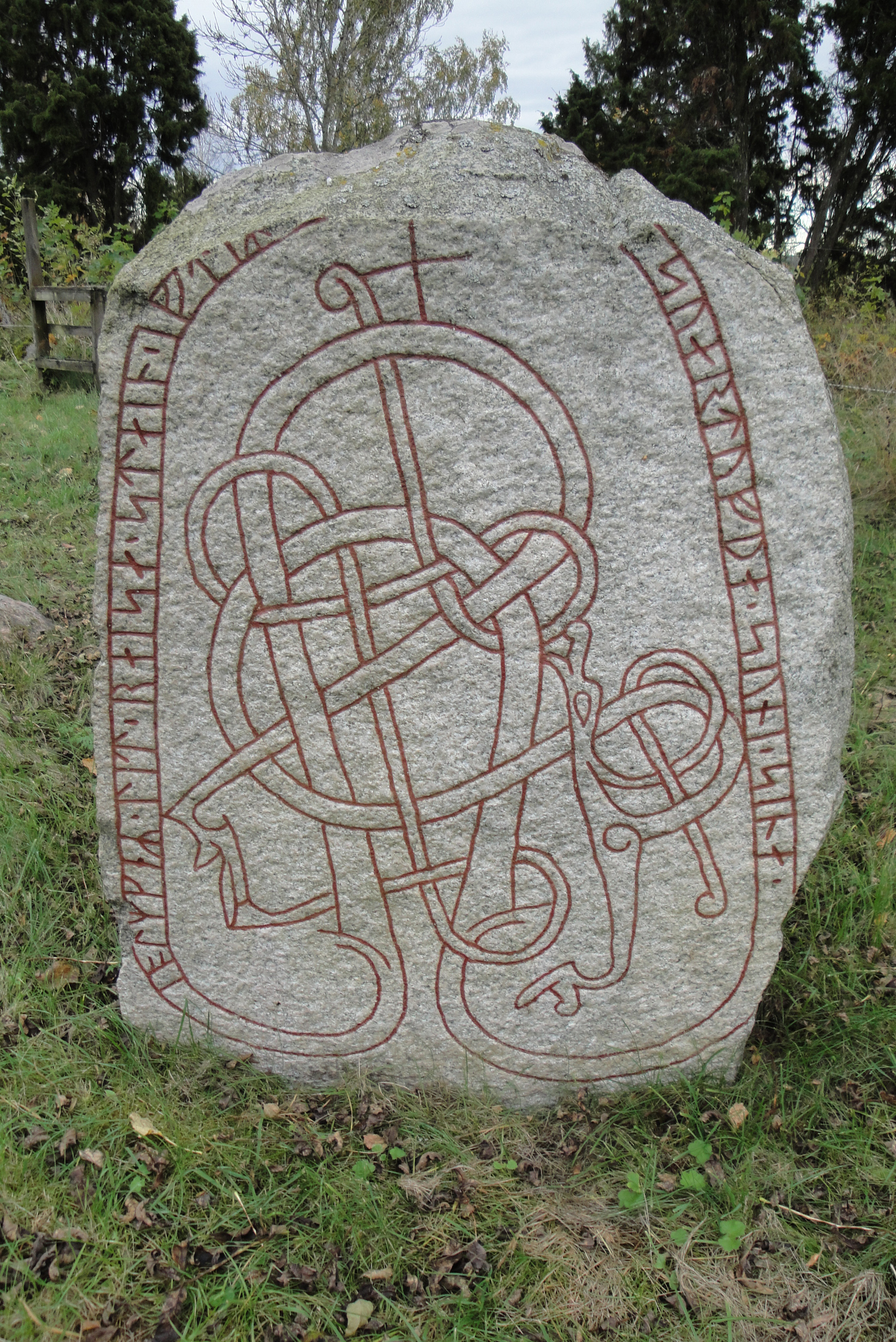 Ärentuna 13:2 U1014